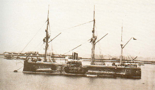 Blindado "Almirante Blanco Encalada" que participó en el desembarco de Chilca. Buque chileno "Almirante Blanco Encalada". Epoca de la Guerra del Pacífico (1879-1884)